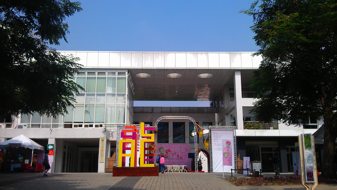 中文（台灣）: 工藝美學館